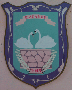 Герб с. Щасливе (Бориспільський район)